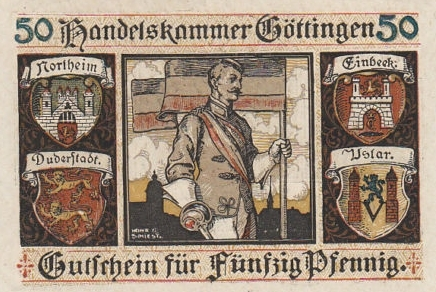 Notgeld der Handelskammer Göttingen um 1923. Das Motiv zeigt einen Verbindungsstudenten in Couleur.